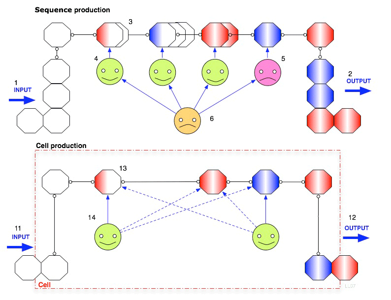 Cell production. Visualization cell versus sequential production.